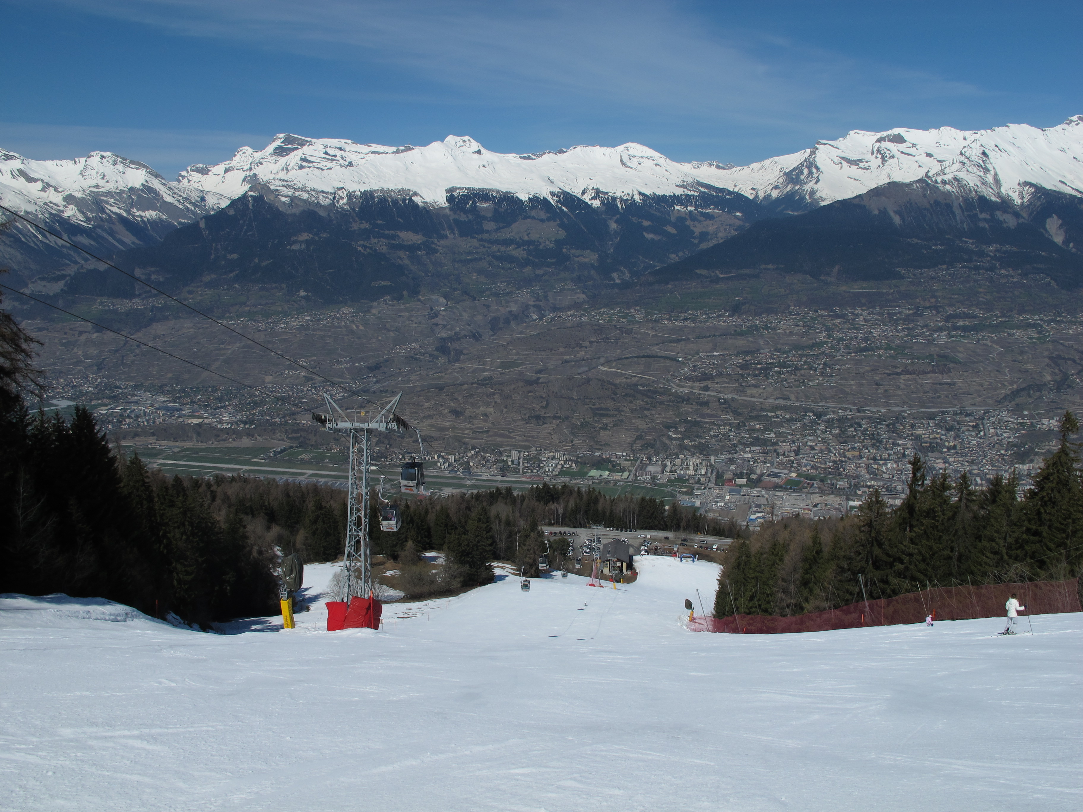 Les Agettes, la Piste de l'Ours.